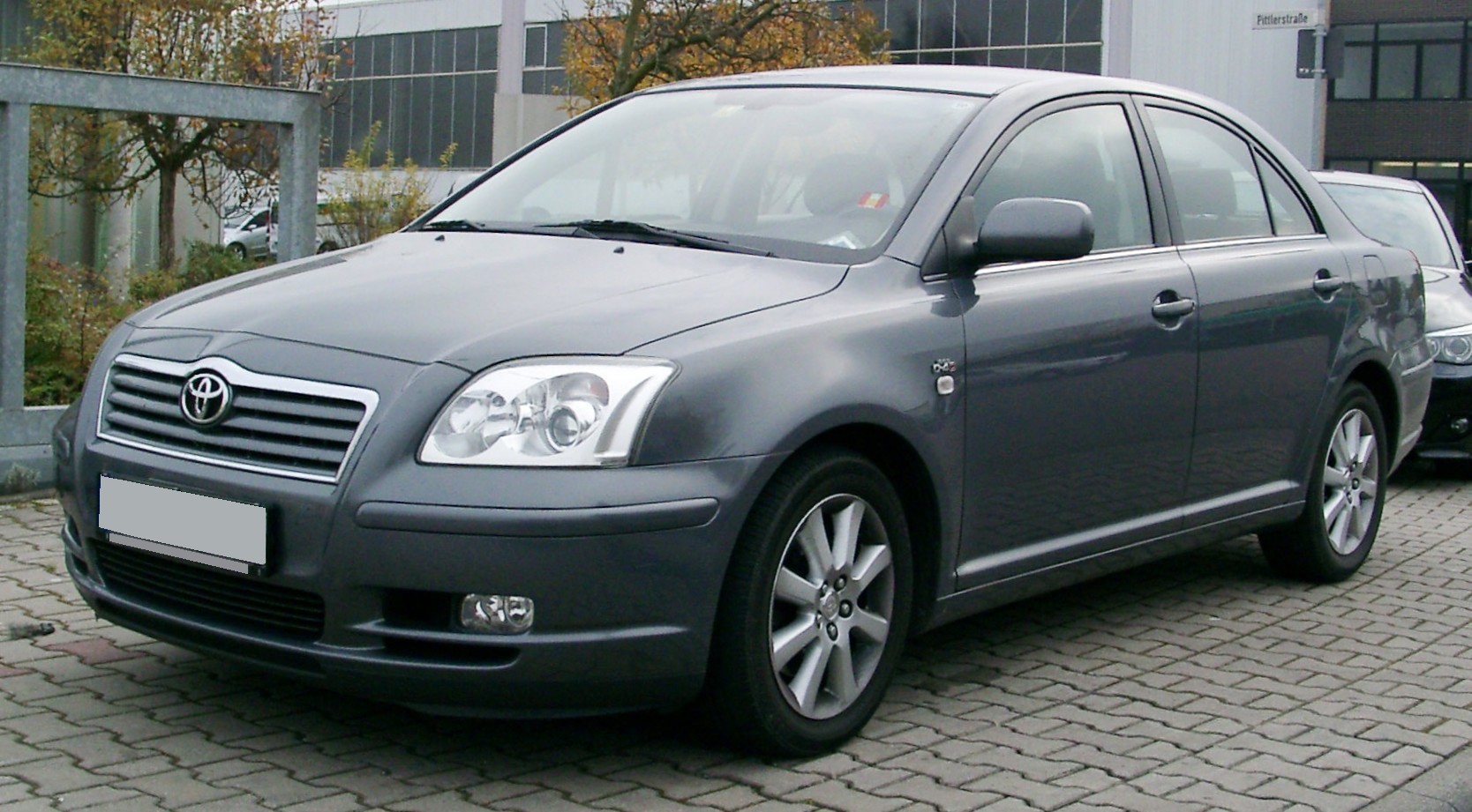 Toyota Avensis, 2. Generation